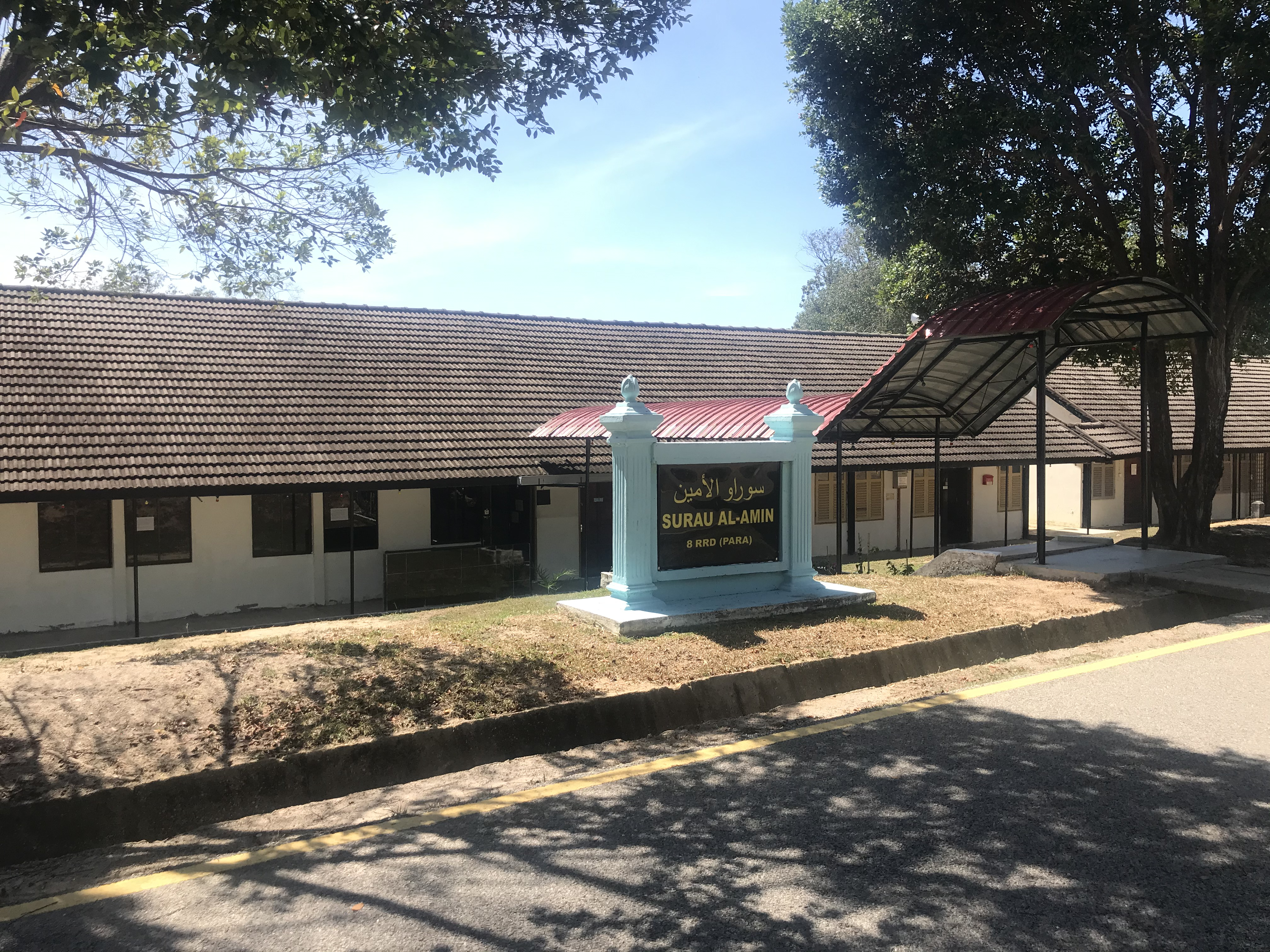 Surau Al Amin 8 RRD (Para)